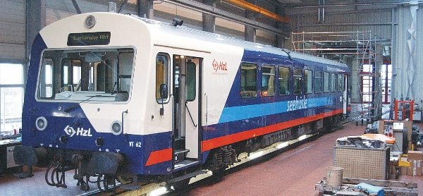 NE 81 im Bahnbetriebswerk der HZL in Immendingen. Es handelt sich um ein Fahrzeug, das auf dem Seehäsle zum Einsatz kommt.